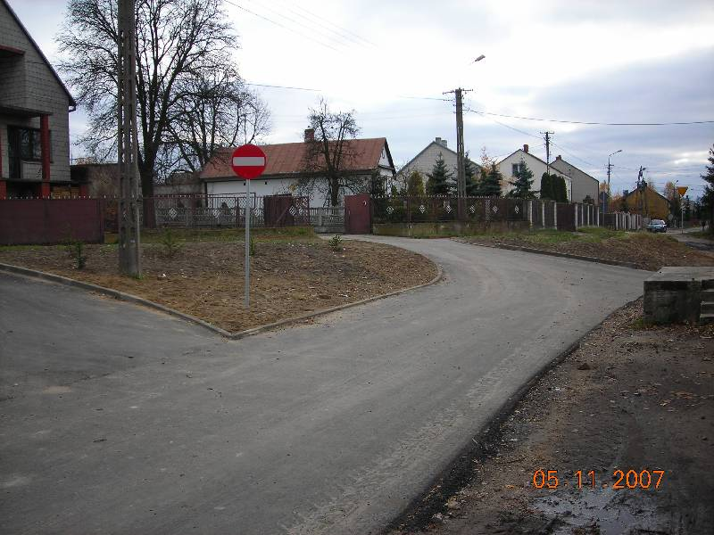 Dziecinów